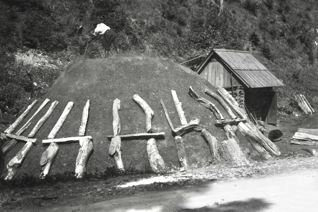 Postavljanje oglarske kope.